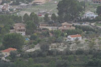 Vue de la Vallée de Bixquert.